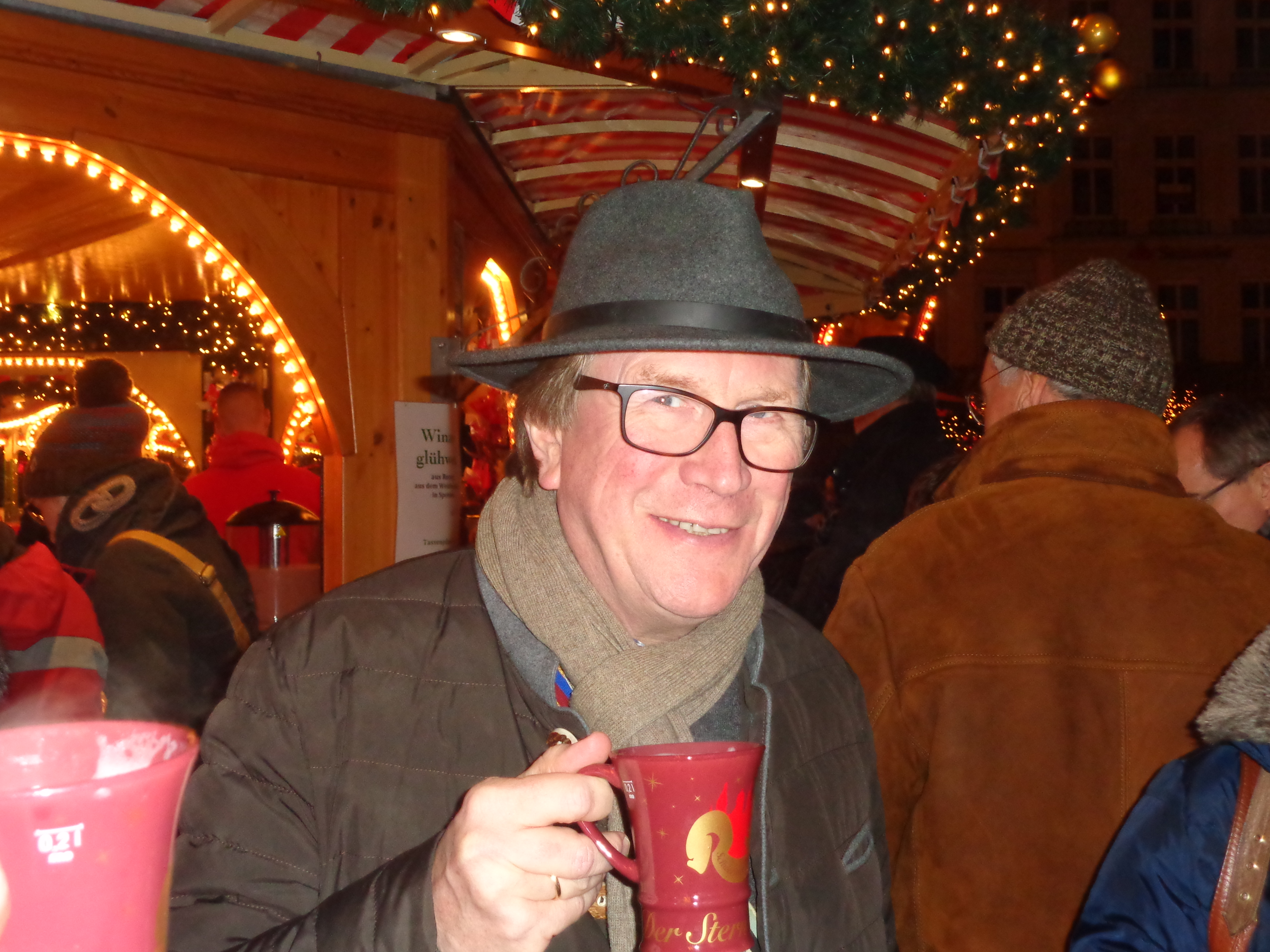 Henning Irmler auf dem Schweriner Weihnachtsmarkt